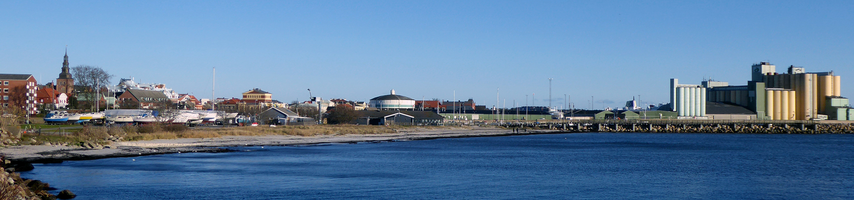 Panorama av Ystad sett från (väster) bostadsområdet Gjuteriet. 27 nov 2016.